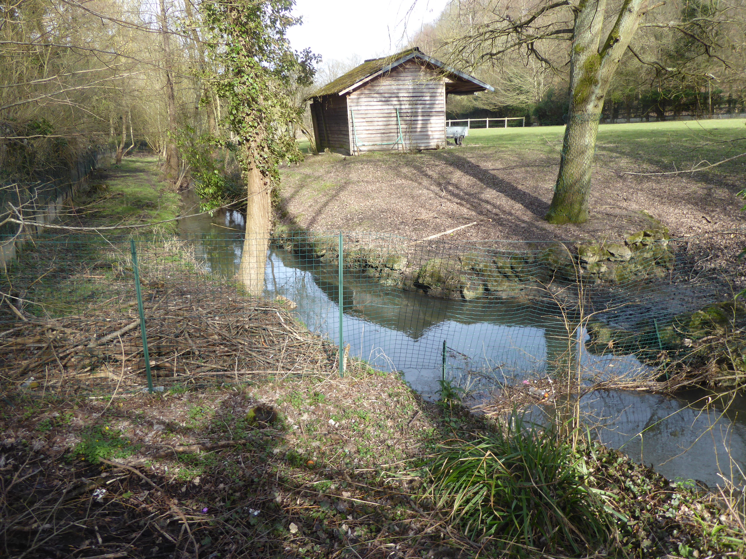 Fontaine des Gobelins